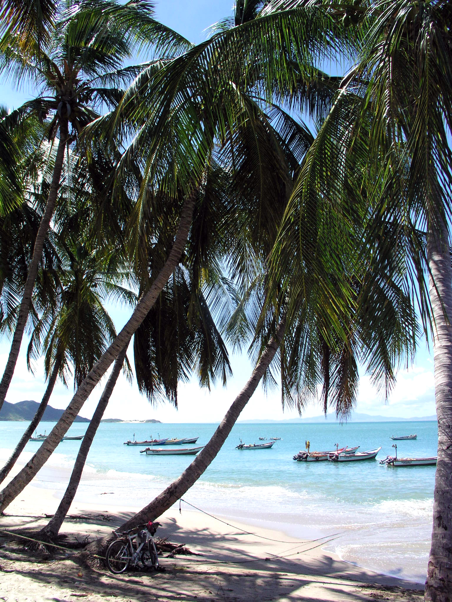 Cocos nucifera, Margarita, Nueva Esparta, Venezuela